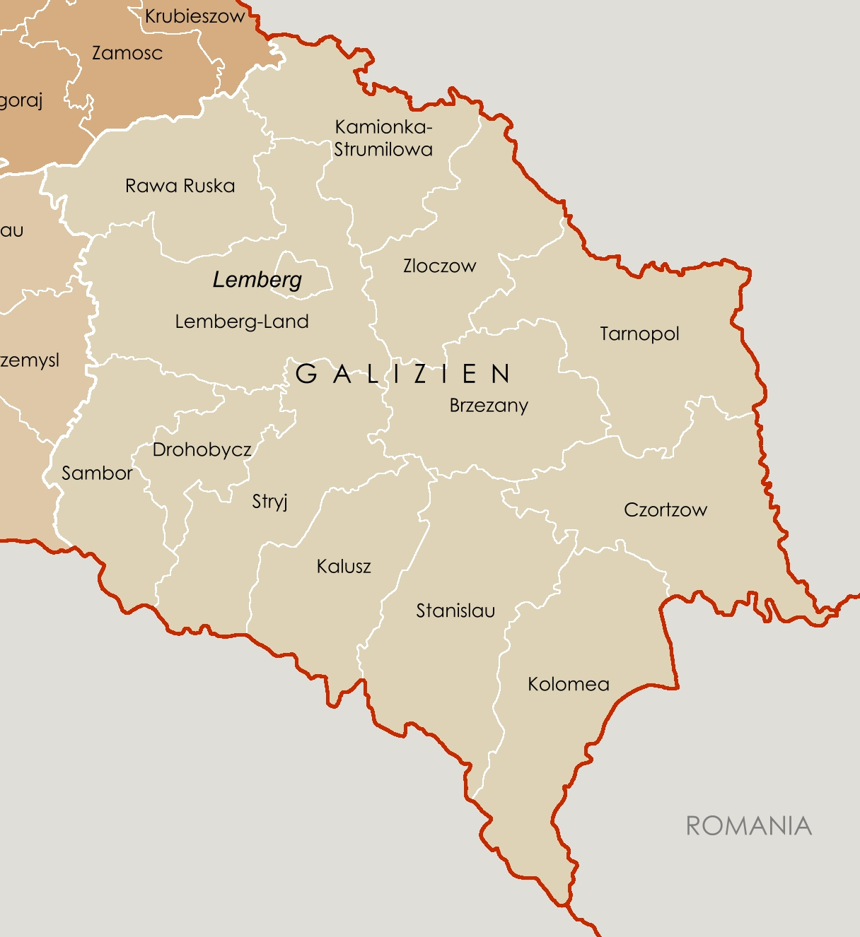 Distrikt Galizien, Generalgouvernement